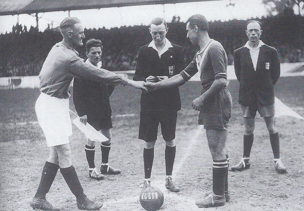 Photo de la finale de la coupe de France 1941 opposant le SC Fives aux Girondins de Bordeaux. Les capitaines Bourbotte et Mancisidor se serrent la main sous les yeux de l'arbitre Boes.